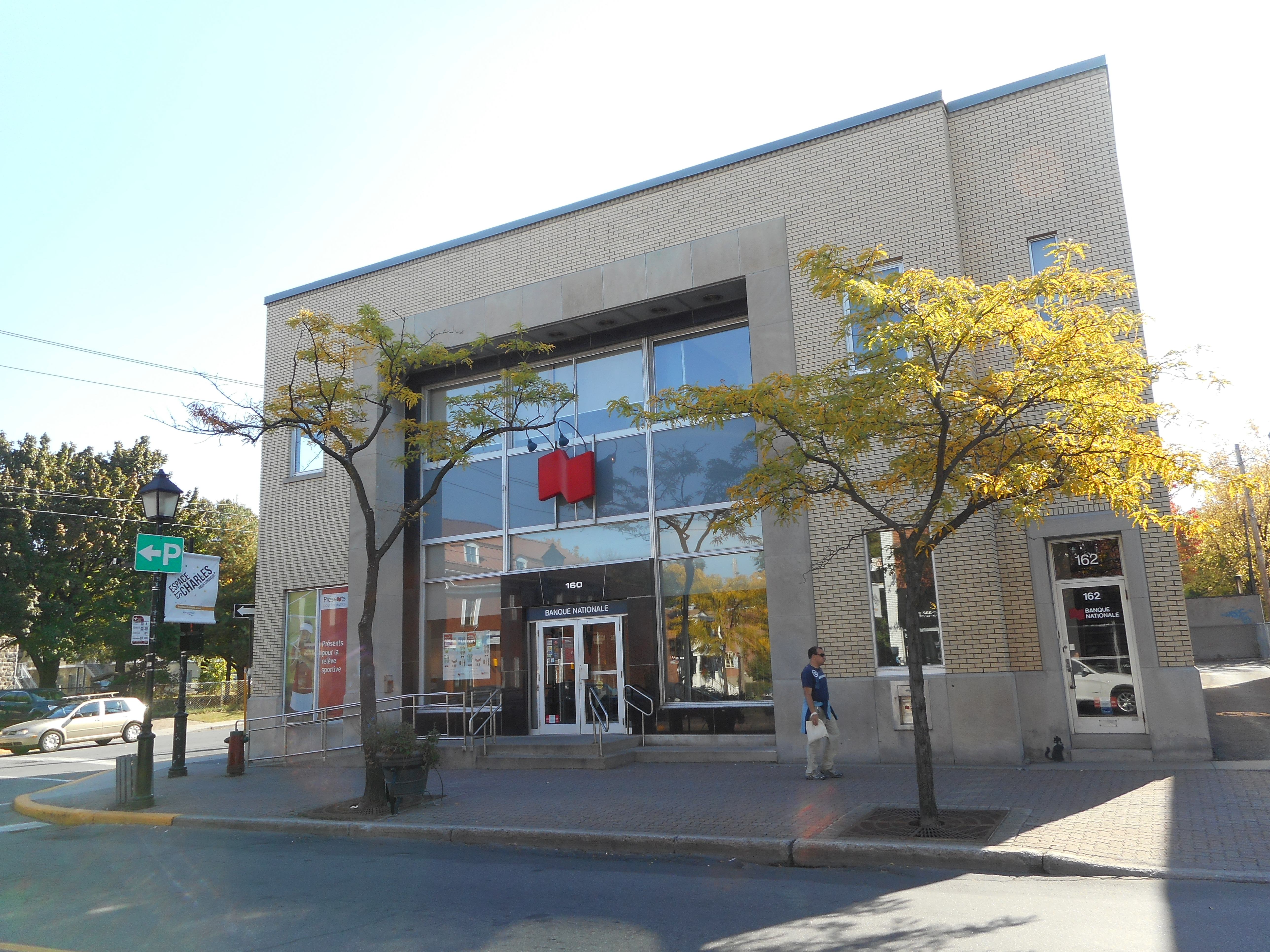 160-162, rue Saint-Charles Ouest, Longueuil, Québec Banque Nationale